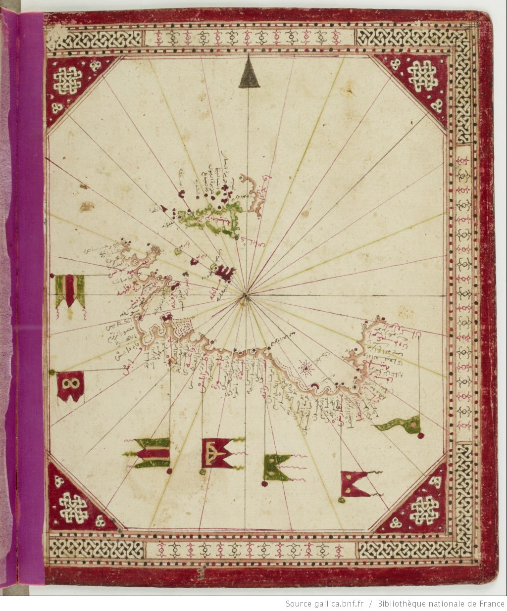 موانئ تونس وليبيا و صقلية ومالطة من كتاب الطبلة لعلي بن احمد بن محمد الصفاقسي